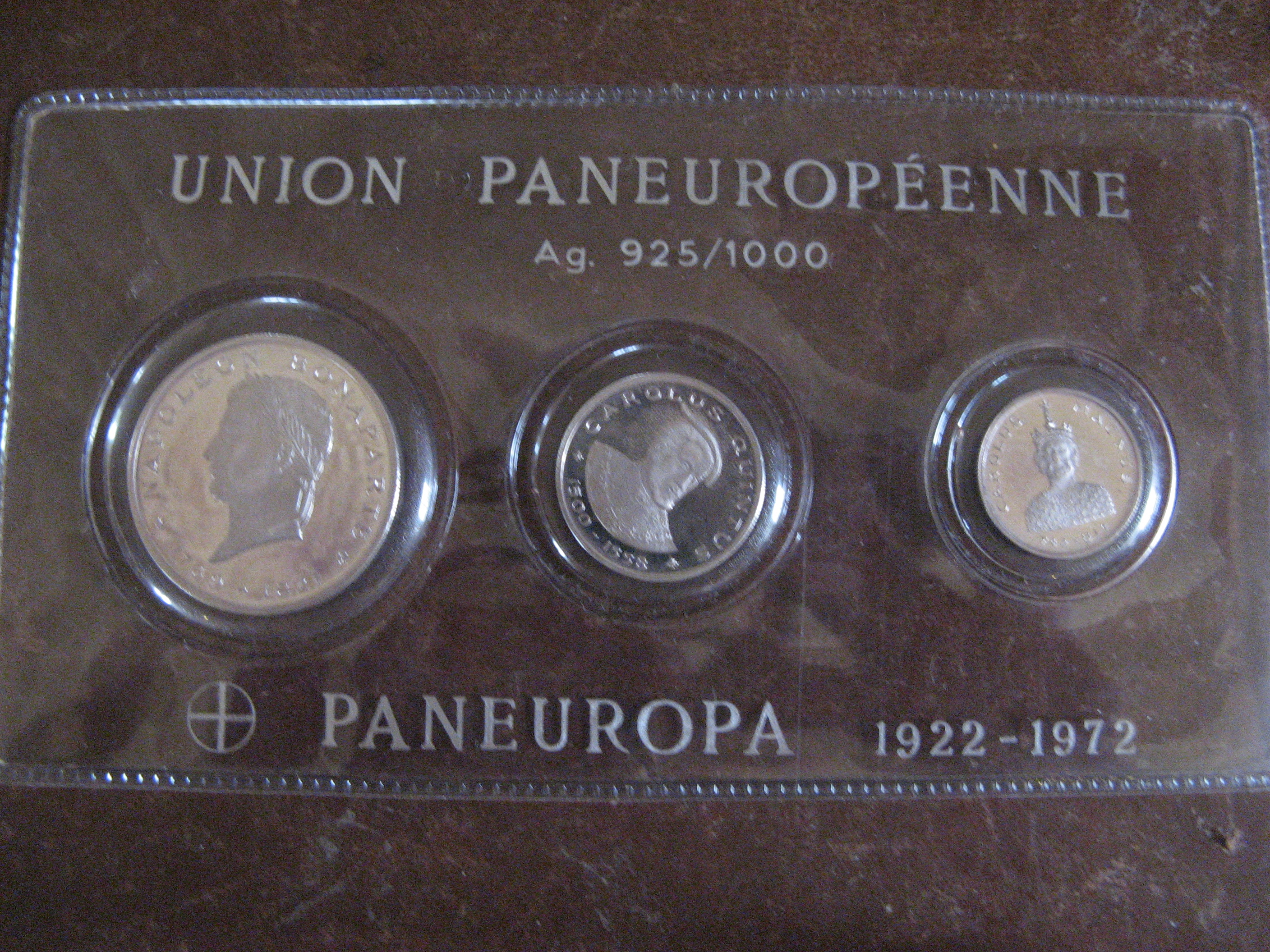 Argent 925/1000 Effigie de Napoléon Bonaparte, Carolus Quintus et Carolus Magnus. 5, 2, et 1 ÉCU